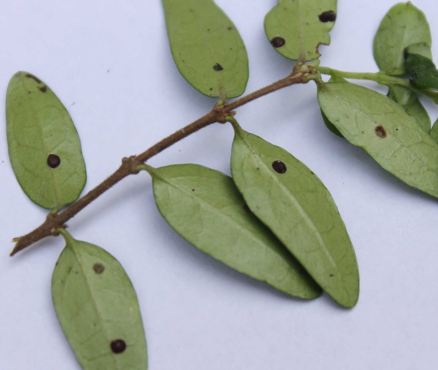 Puklice na zimolezu L. nitida